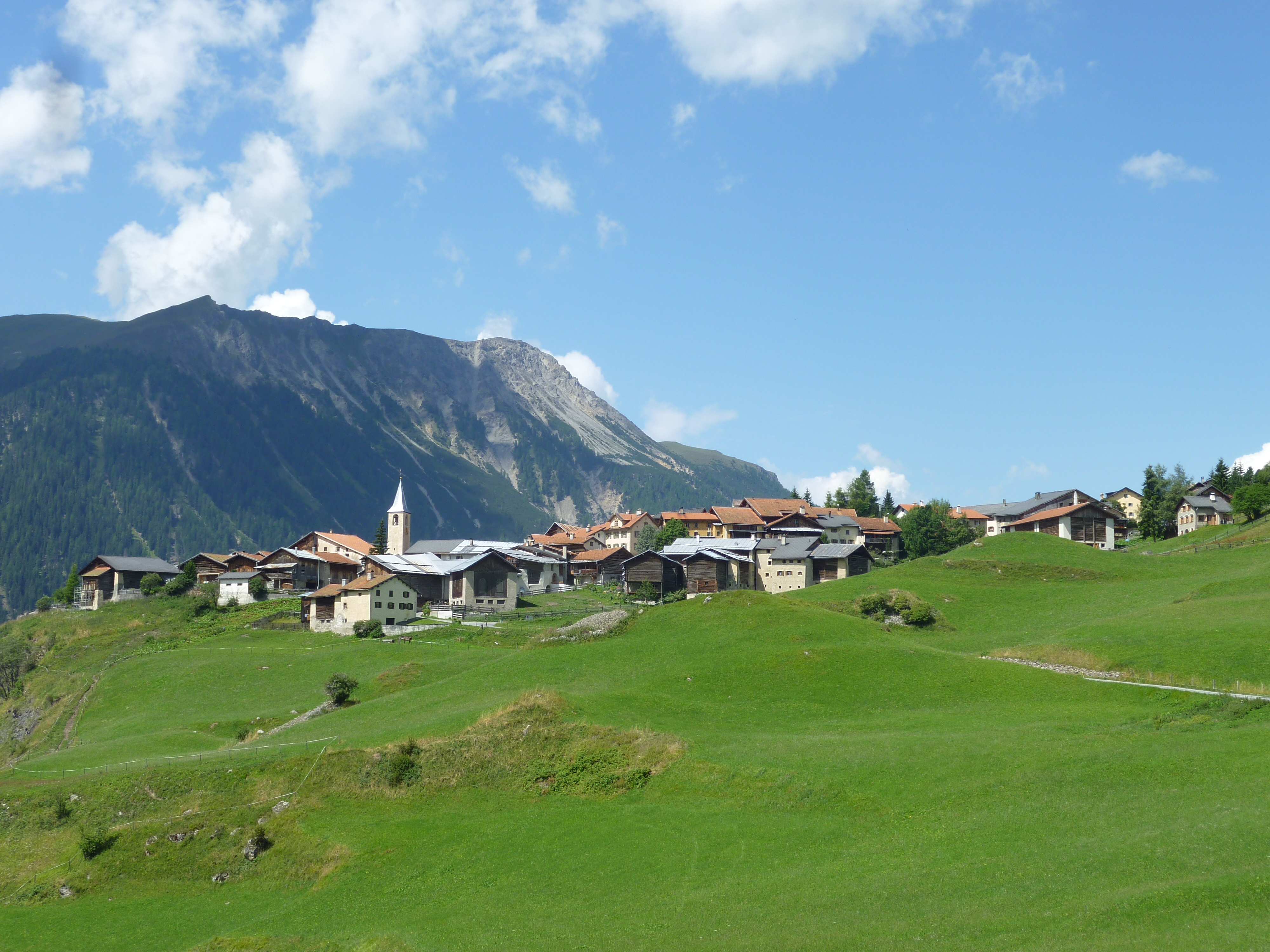 Latsch GR